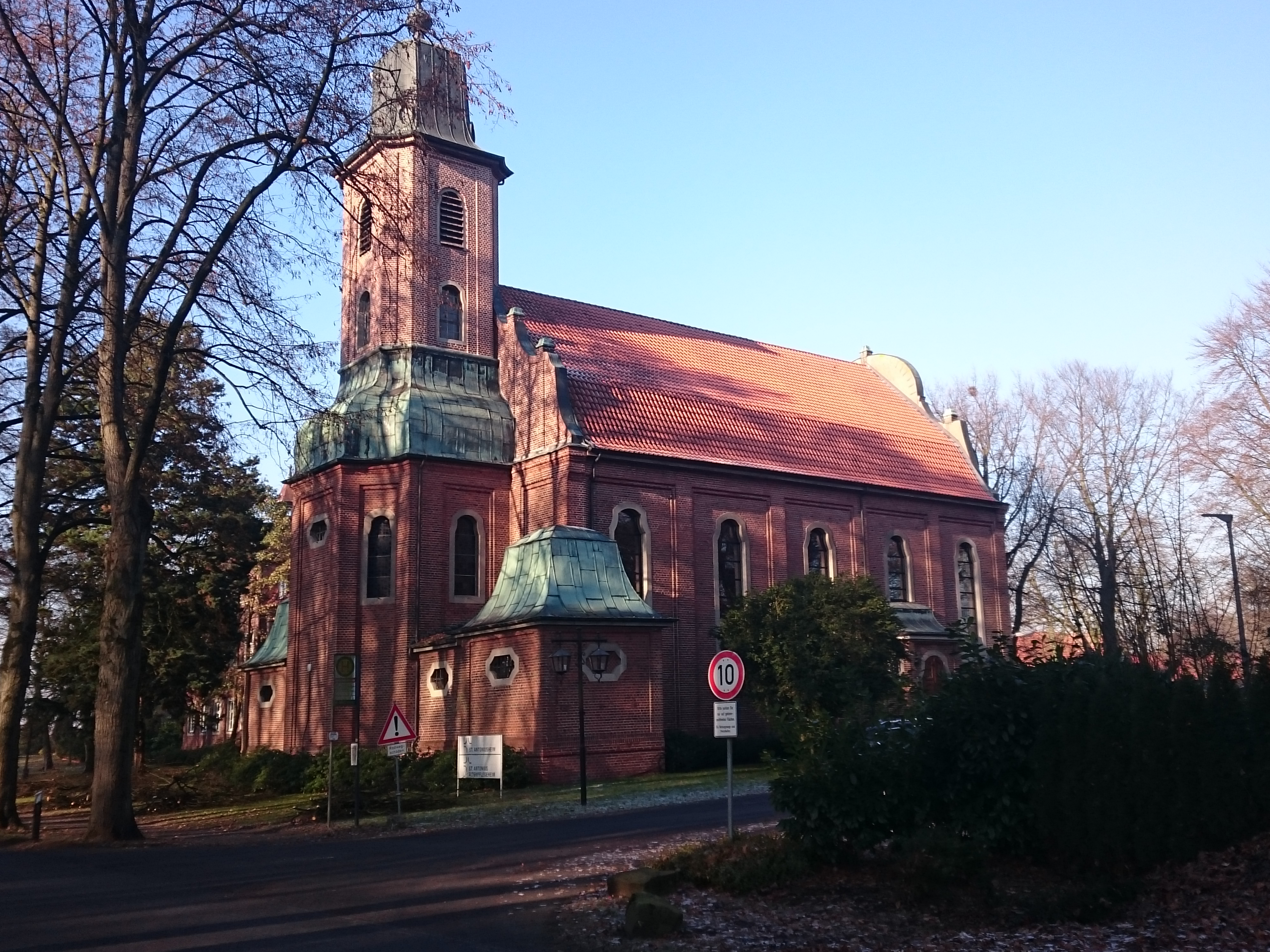 Bild der profanierten Kapelle des St. Antoniusheimes in Vreden